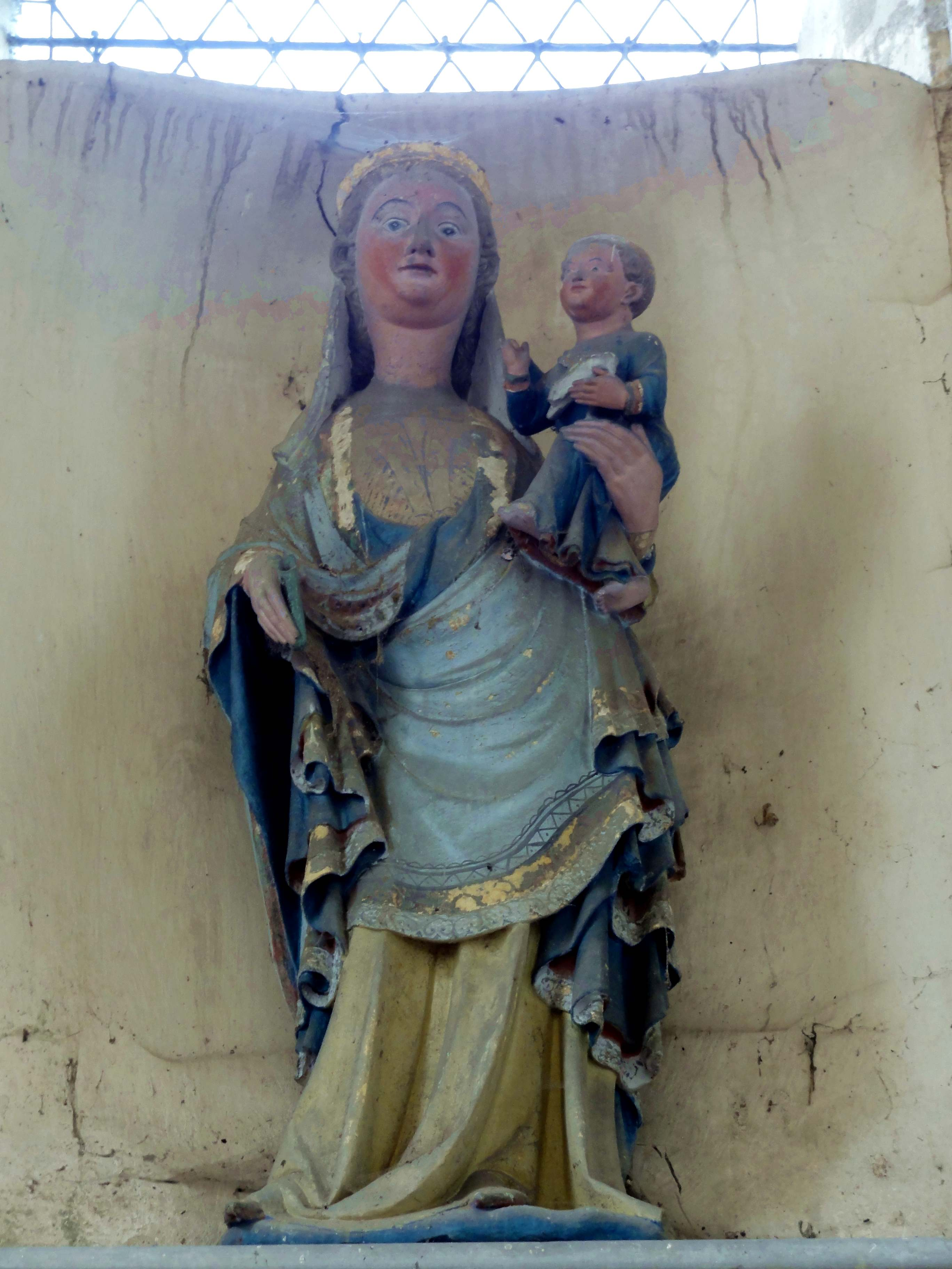 Statue de la Vierge à l'Enfant.